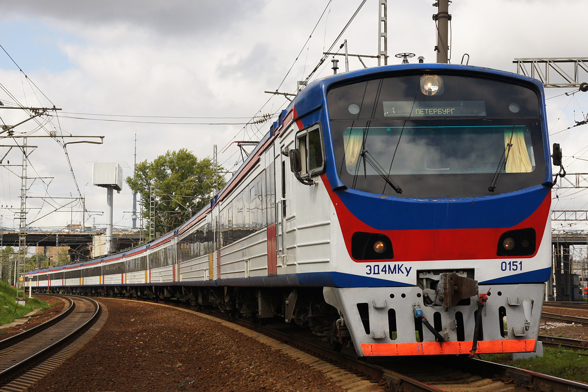 Электропоезд повышенной комфортности построен в 11-вагонной составности Эксплуатация: • с завода поступил в собственность ООО «Пассажирские перевозки» до 2009 — работал на маршруте Санкт-Петербург — Москва, техническое обслуживание проводилось в ТЧ-10 OKT Санкт-Петербург-Московское (Металлострой) 01.04.2010—31.01.2013 — курсировал по маршруту Ярославль — Москва (экспресс), техническое обслуживание проводилось в ТЧ-4 СЕВ Данилов __.07.2010 — вместо вагона 015111 вцеплена секция ЭД4М-0124 07-08 (вагоны 3-го класса) __.02.2013—02.04.2016 — курсирoвал по маршруту Санкт-Петербург — Москва, техническое обслуживание проходил в ТЧ-10 OKT Санкт-Петербург-Московское (Металлострой) • __.06.2016 — передан ОАО «Центральная ППК» с 18.08.2017 — работает на маршруте Москва — Усово Техническое обслуживание проходит в ТЧ-4 Железнодорожная Мск Peмонт: 02.2014 — КР-1 ОАО «Октябрьский ЭВРЗ» 01.2015 — ТР-2 ТЧ-6 ОКТ Крюково вагон 015111 оборудован выходом на низкие платформы